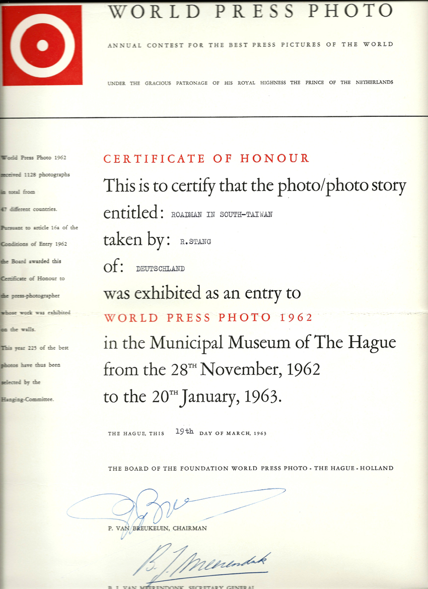 Auszeichnung zur World Press Photo '62, Den Haag